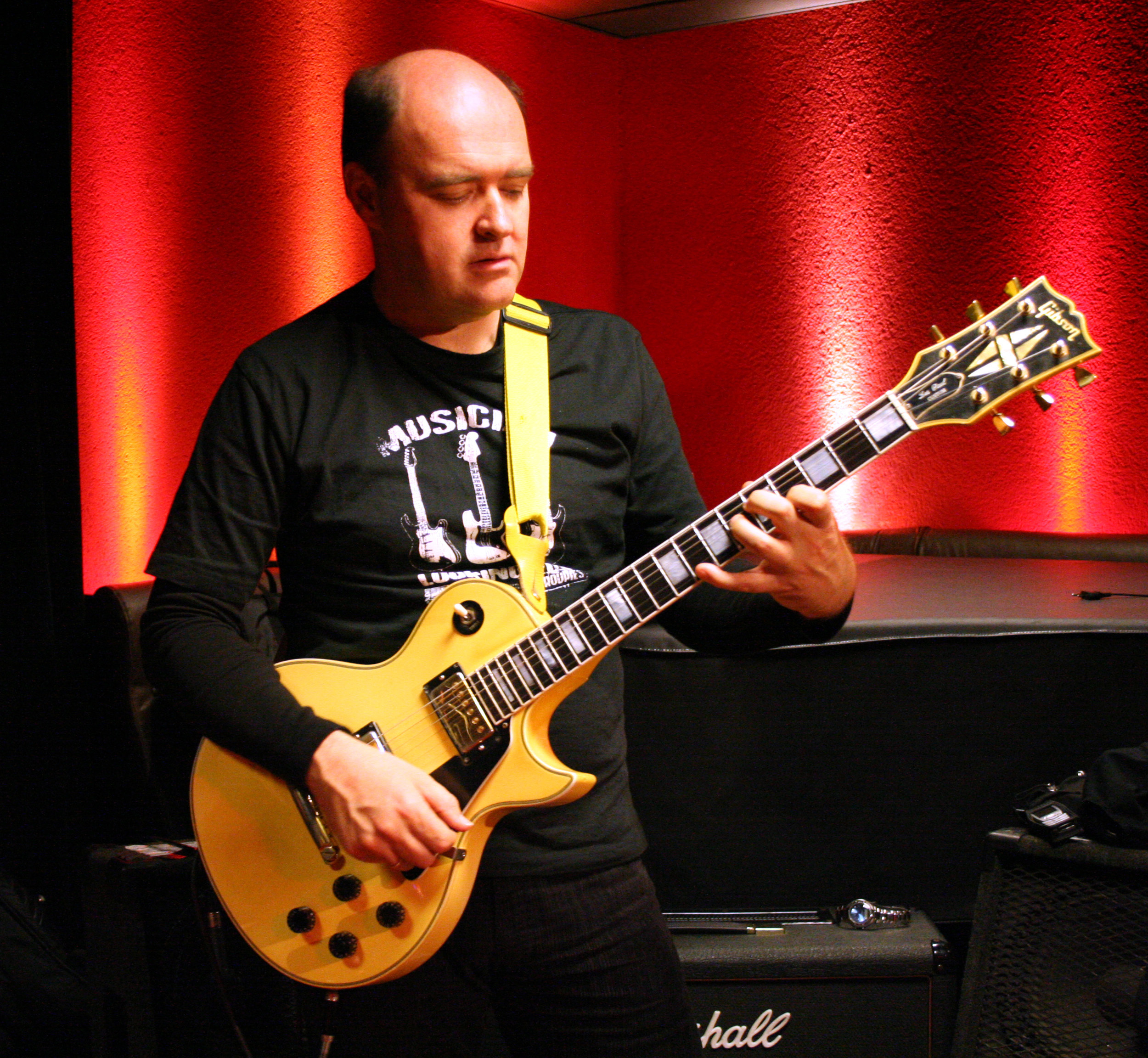 Peter O´Mara playing guitar